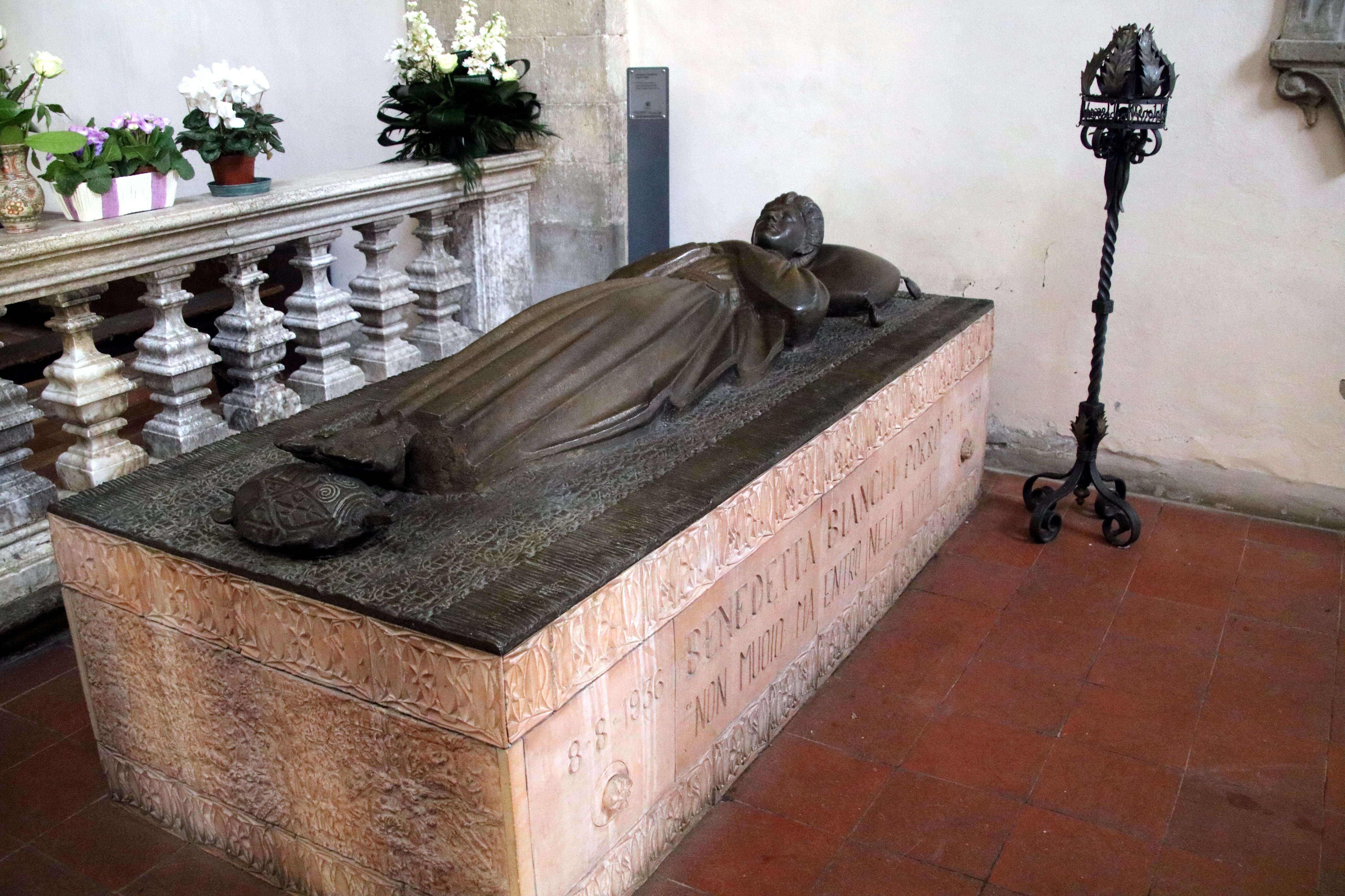 Tomba di Benedetta Bianchi Porro, Chiesa di Sant'Andrea (Dovadola)